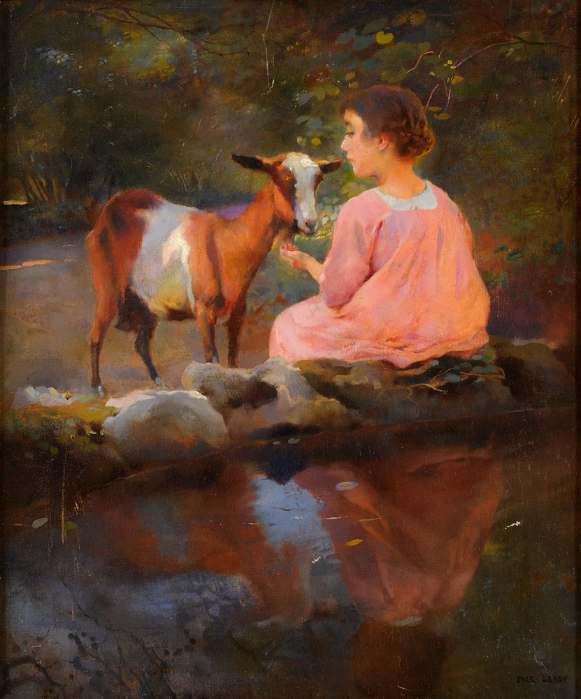 A la Fontaine, Alger 1901